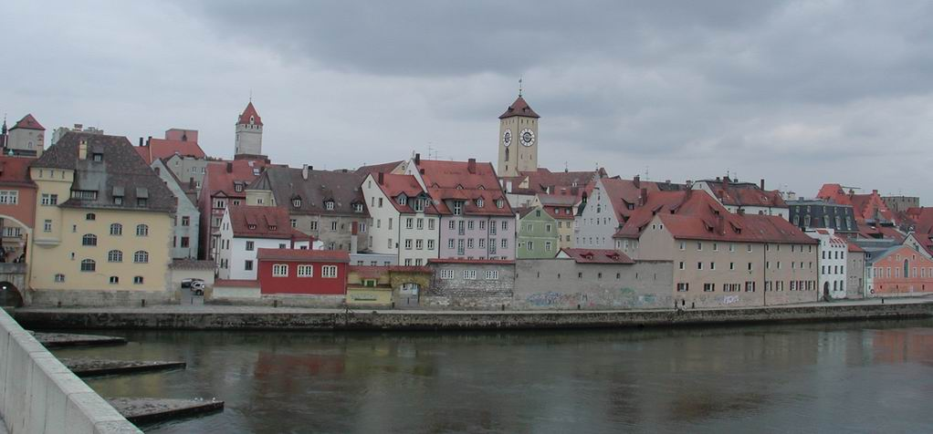 Ratisbona (Germania). immagine scattata da me nel marzo 2004 e rilasciata come GNU etc.